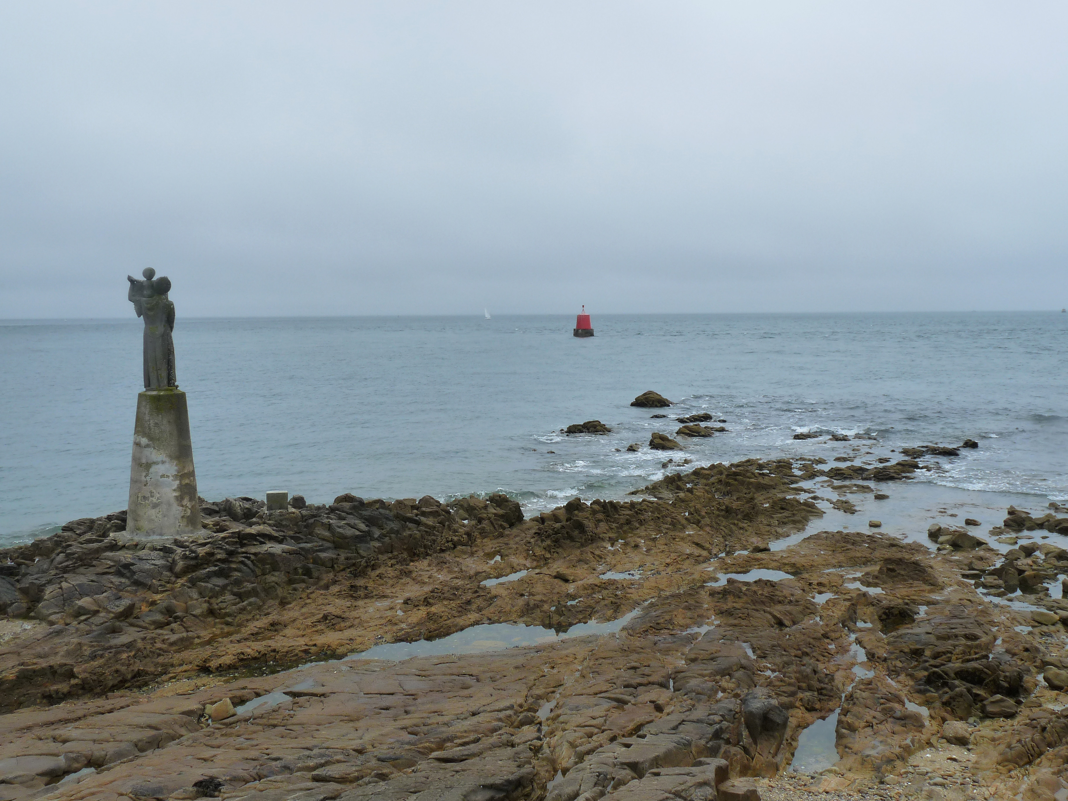 Statue de Notre-Dame de Kerdro, par Jules-Charles Le Bozec (1898-1973). Pointe de Kerpenhir (Morbihan)